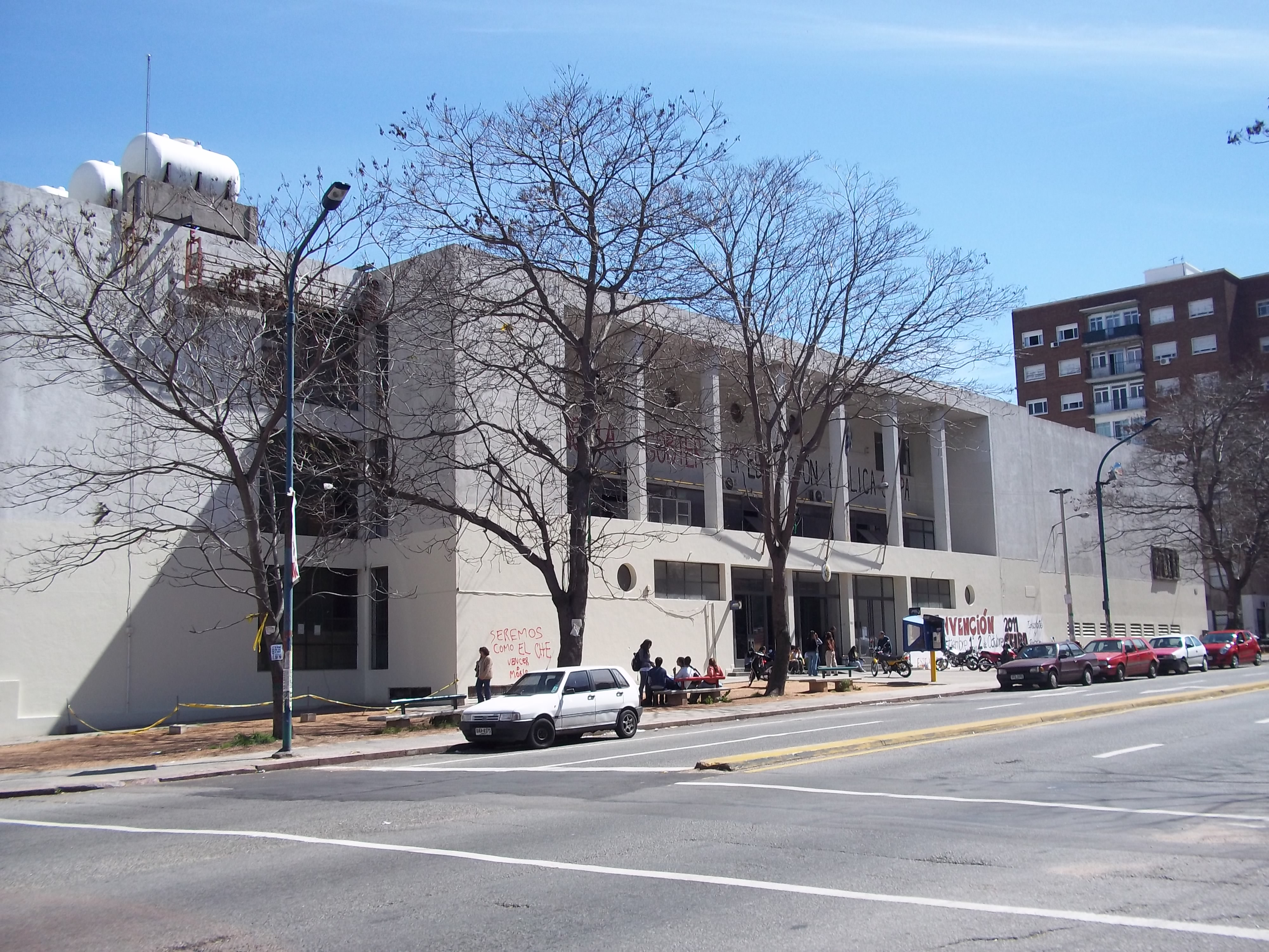 Edificio del Instituto de Profesores Artigas (IPA), en Avenida del Libertador, Montevideo, Uruguay.